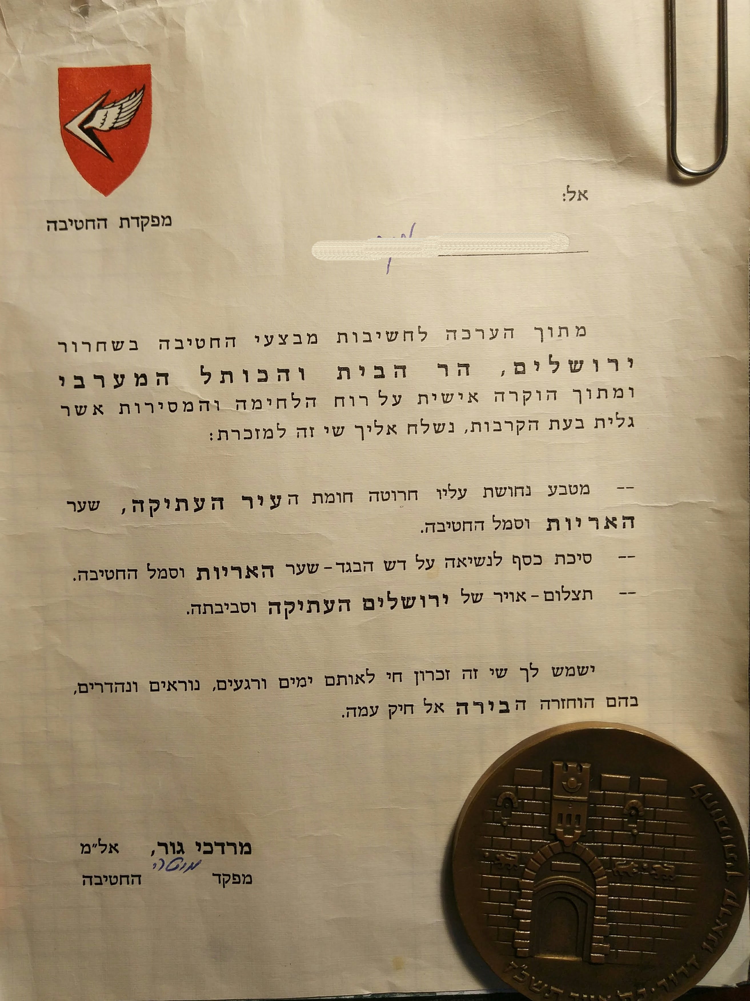 מכתב הוקרה ומדליה שניתנו ללוחמי יחידה 55 בזכות גבורתם בקרבות הקשים על ירושלים